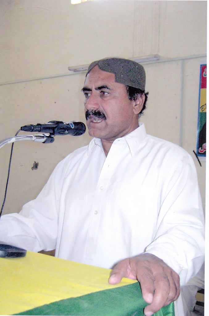 Shaheed Mir Nooruddin Mengal.